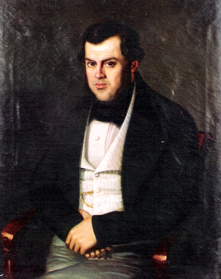 Retrato de Domingo Faustino Sarmiento a la edad de 34 años. Realizado en 1845 por Benjamín Franklin Rawson.